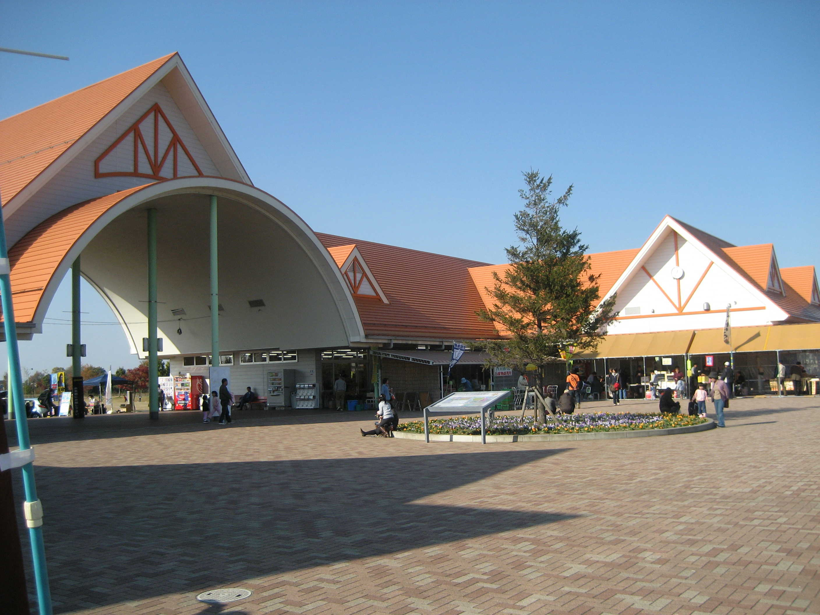 アグリパークゆめすぎと建屋